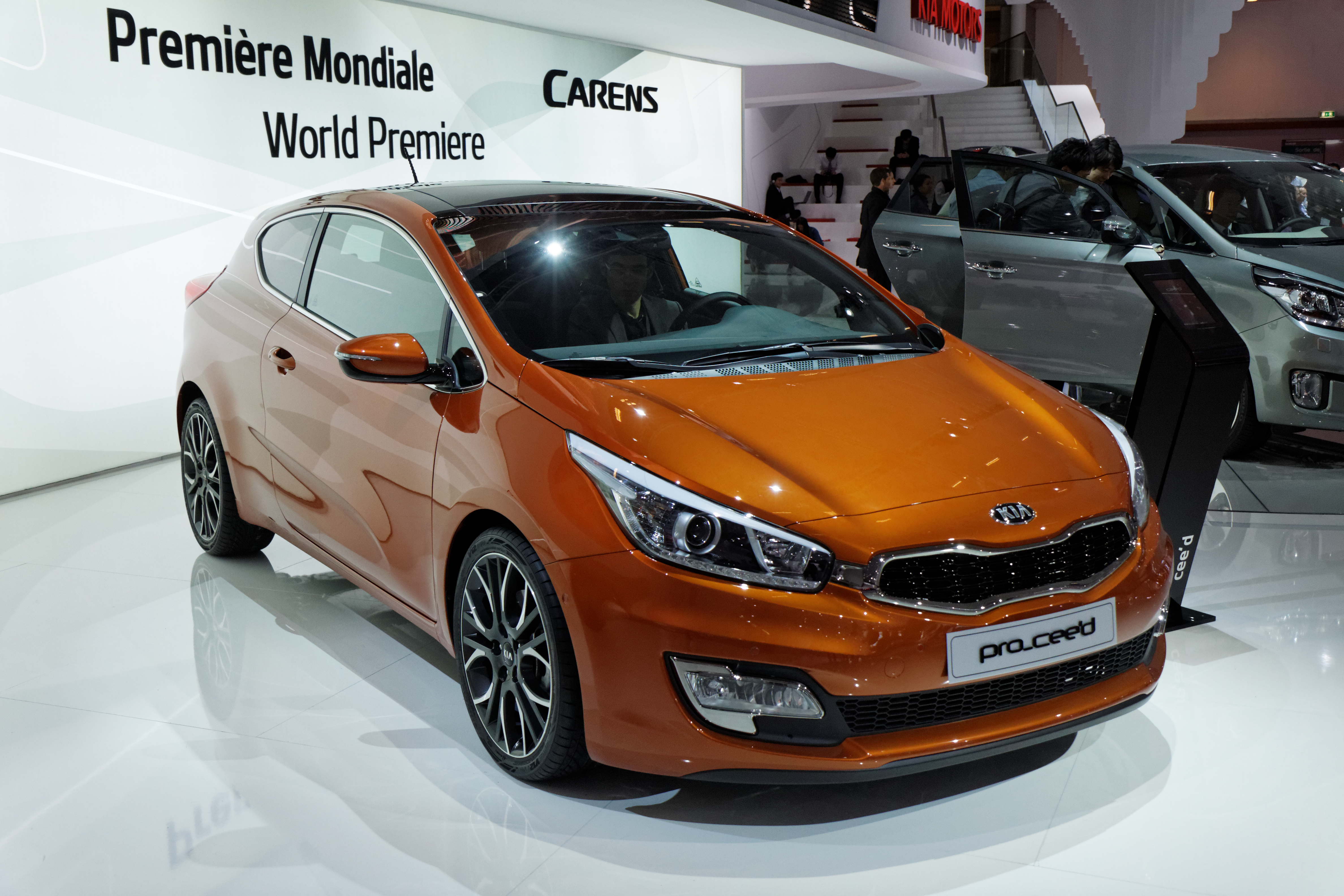 Une Kia Pro cee'd présentée lors du Mondial de l'Automobile de Paris 2012.